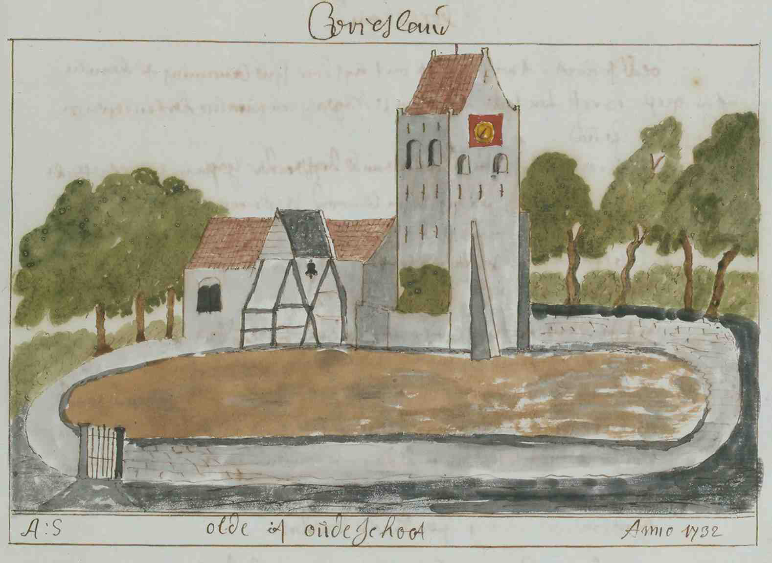 Korte Beschreijving van de Steden Dorpen Gehugten en Heeren-huizen der Heerlykheid Vriesland Benevens Desselfs Afbeeldingen Meest na 't leven getekent By een Vergaderdt Door Andries Schoemaker